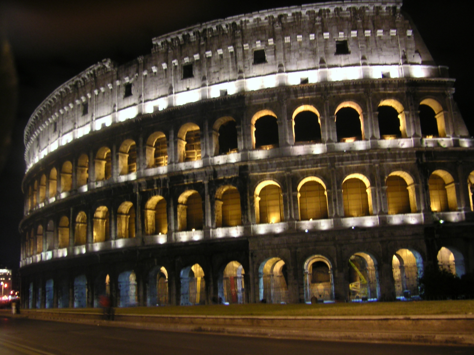 Foto:Jimmy Engelbrecht